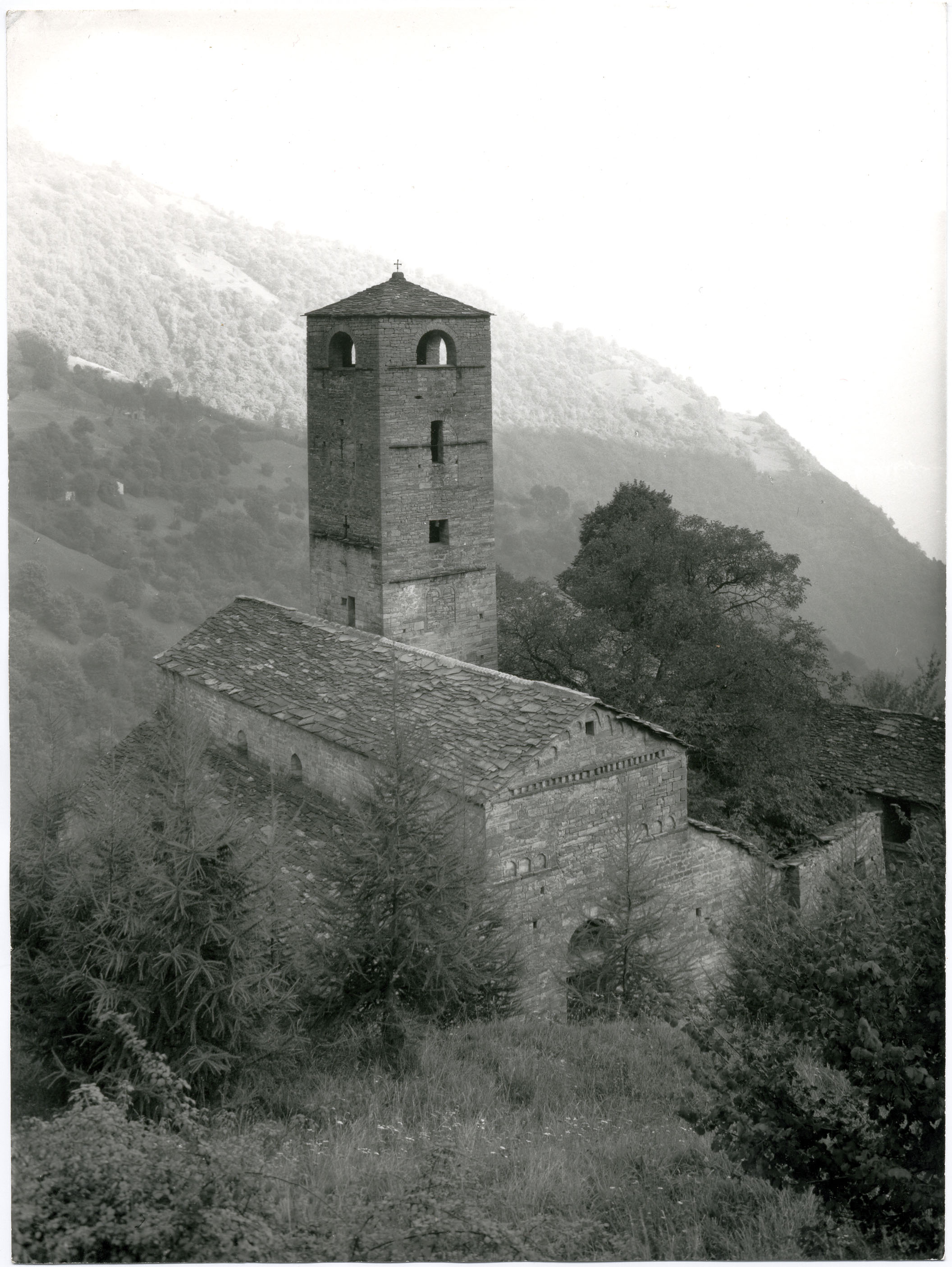 Ossuccio - Chiesa di S. benedetto in Val Perlana. Archivio Pietro Pensa, fondo fotografico, selezione di Elvia Redaelli, 2008, n. 83.